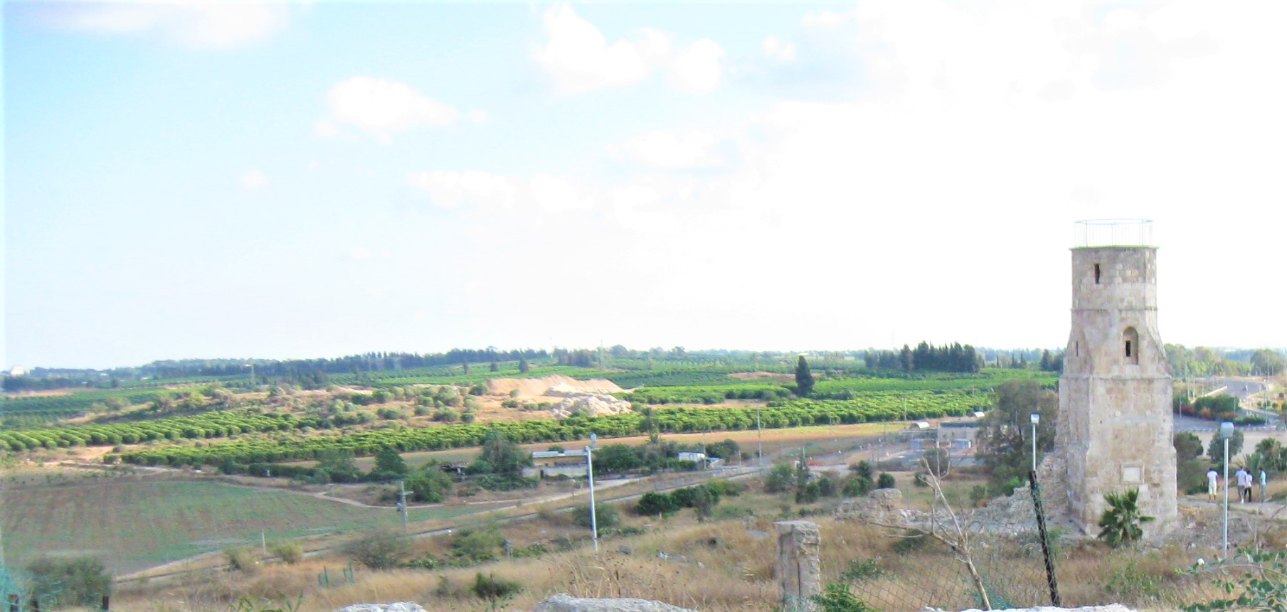 قرية يبنا المحتلة سنة 1948